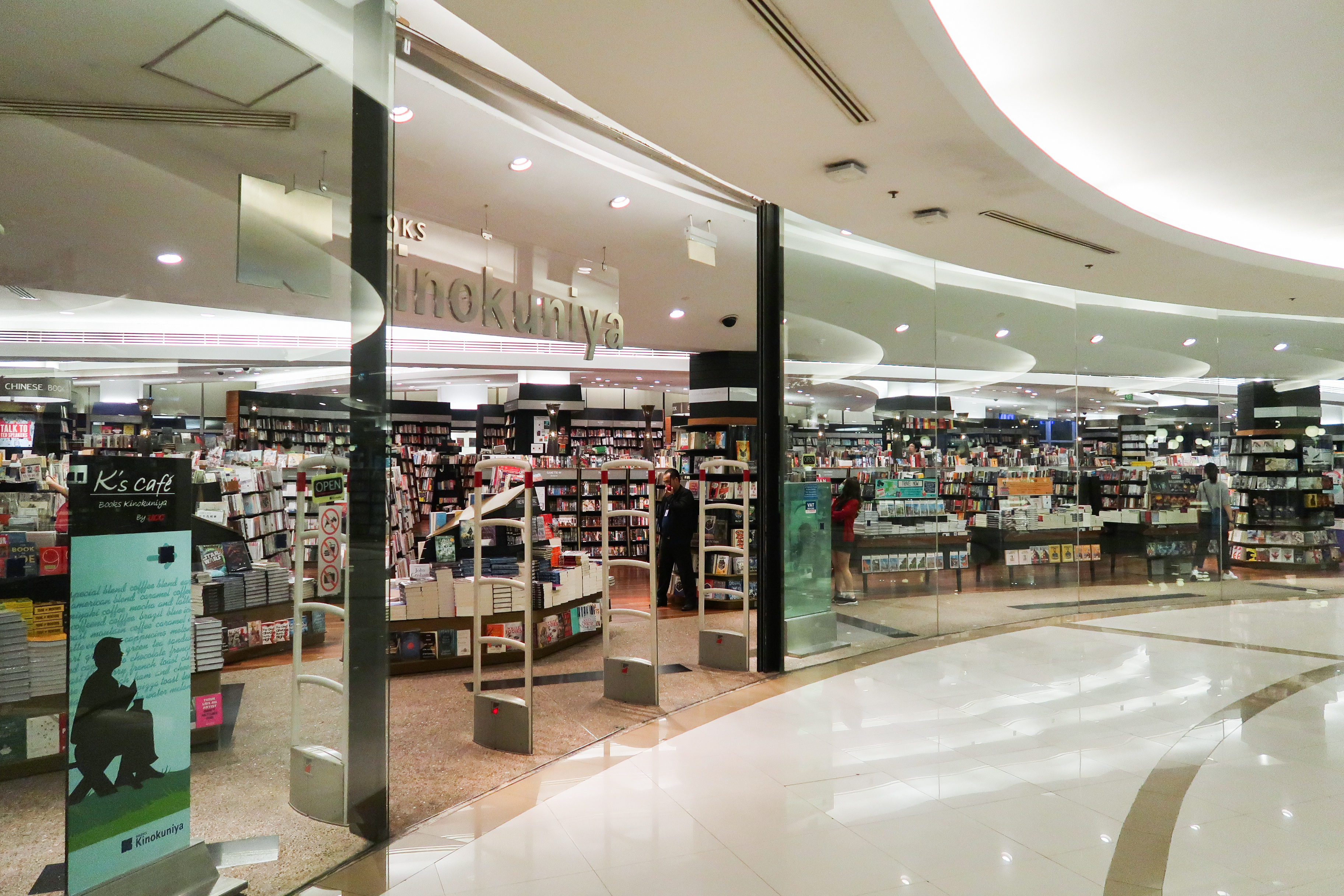 Books Kinokuniya in Siam Paragon